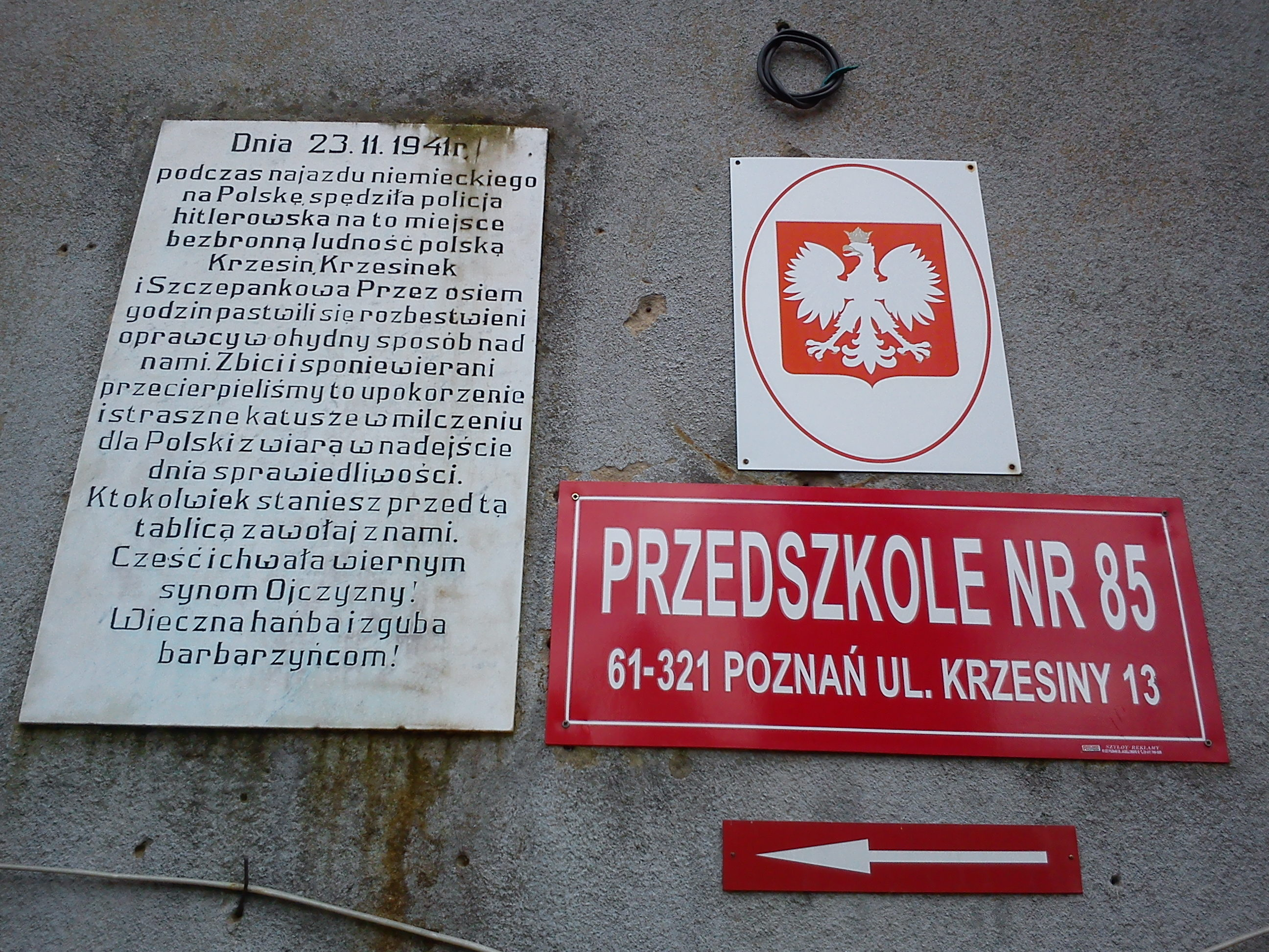 Poznań, ul. Krzesiny 13 - dwór na Krzesinach, obecnie przedszkole.